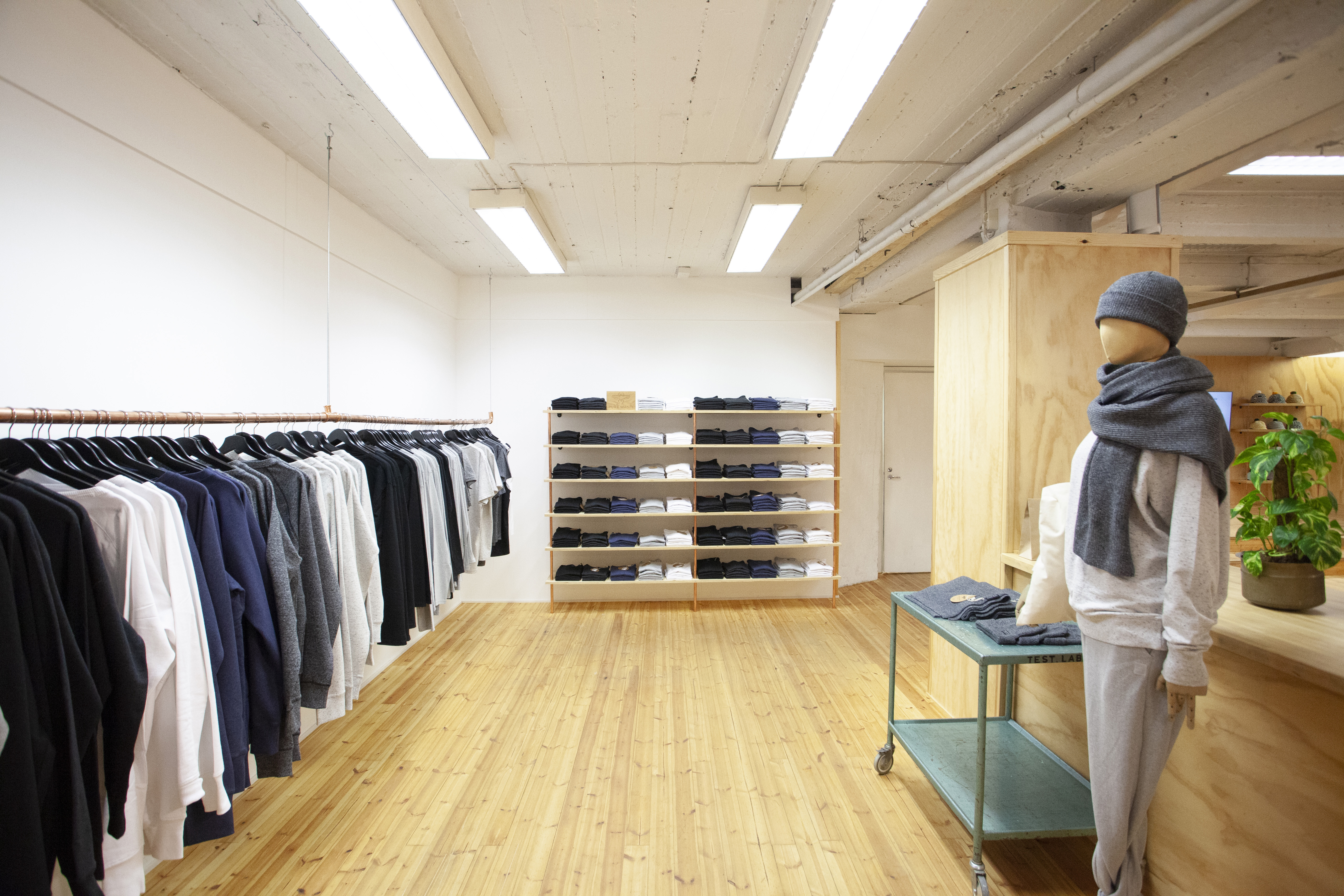 Pure Waste -yrityksen myymälä Helsingissä Yrjönkadulla.